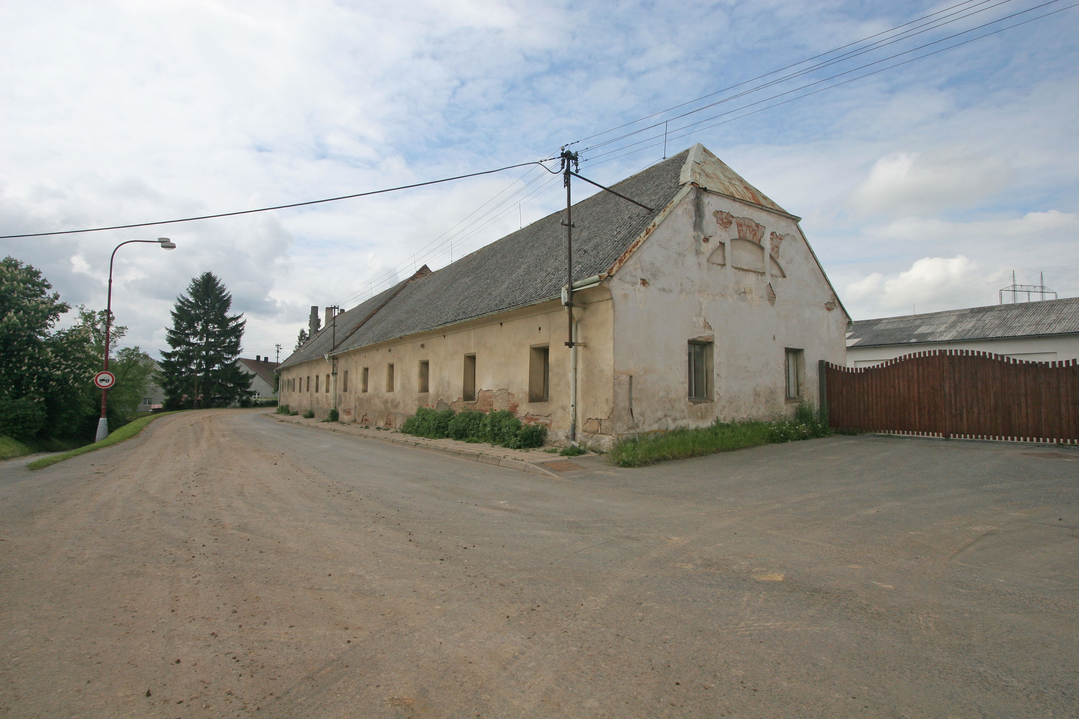 Vestec čp. 2